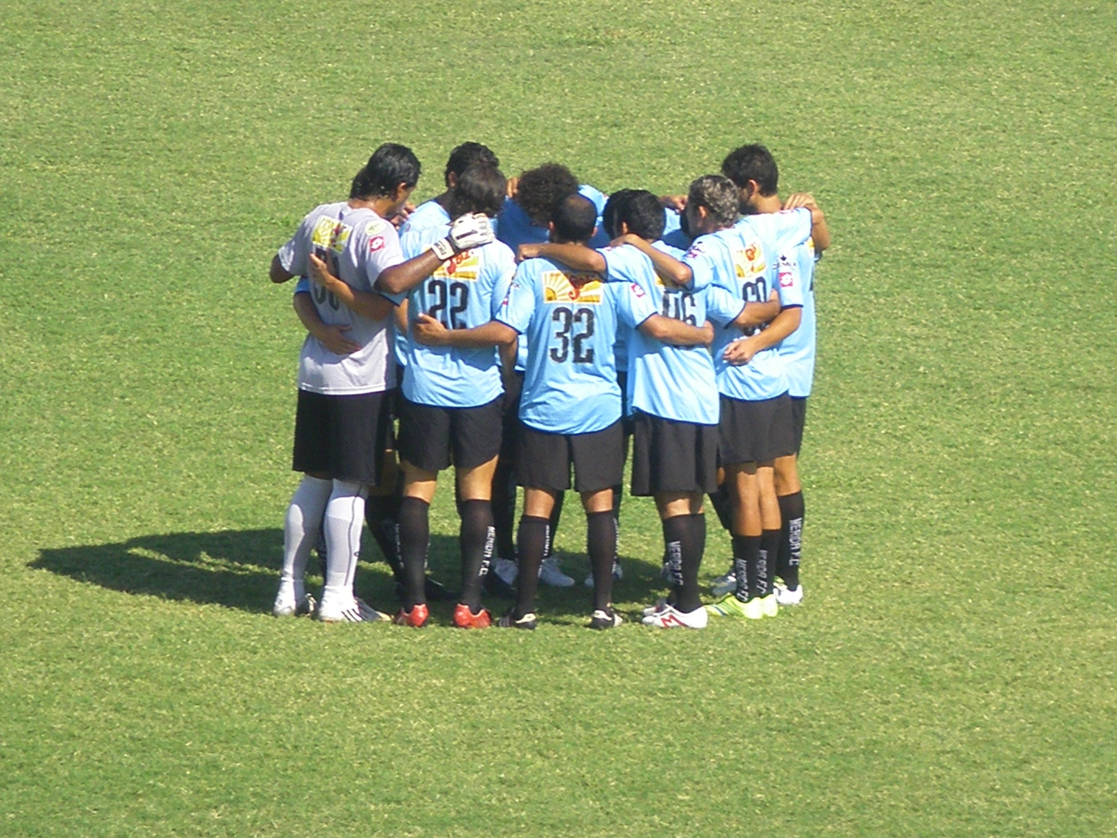 Beschwörungskreis vor dem Anstoß